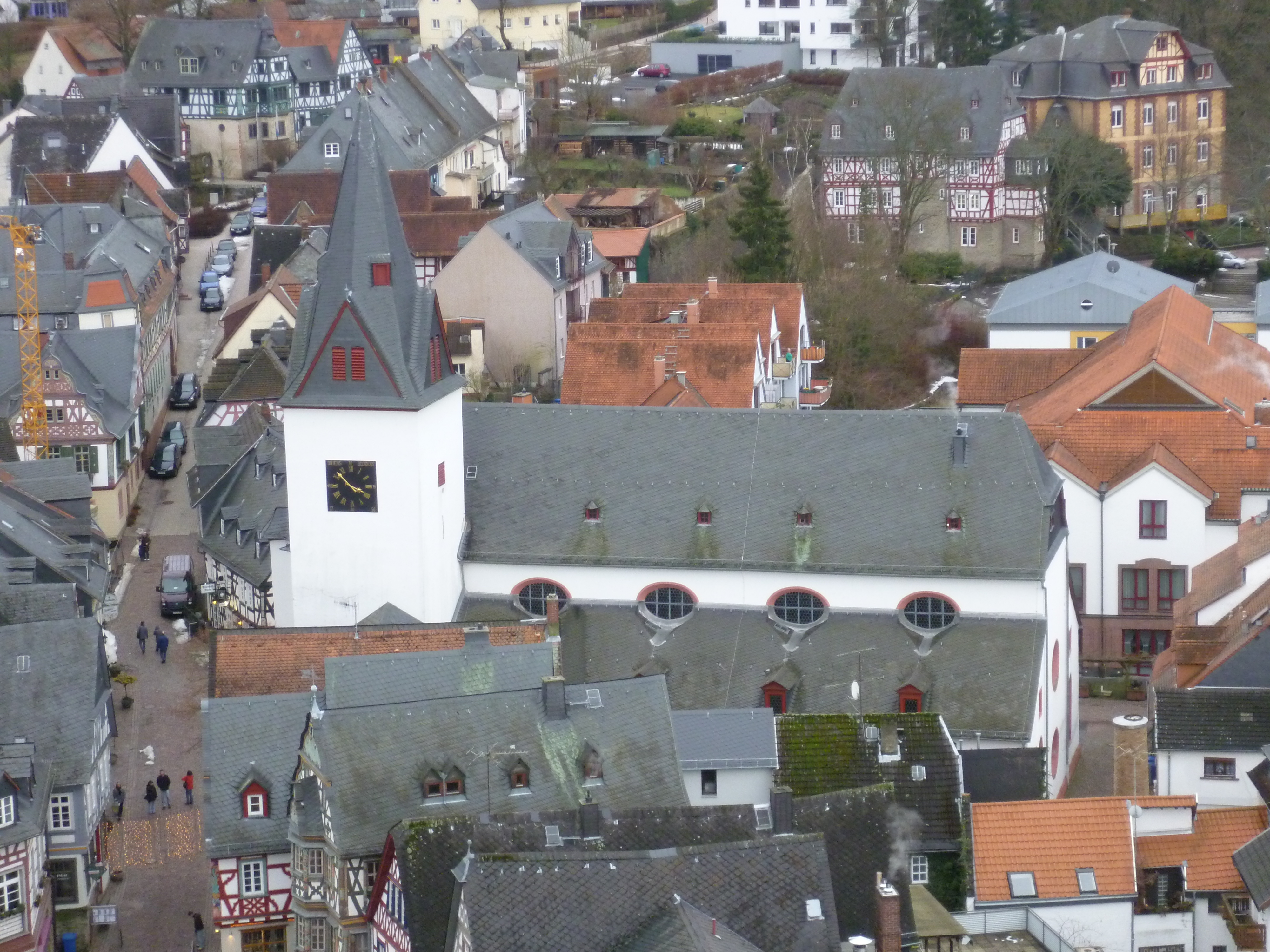 Die Unionskirche in Idstein im Stadtbild